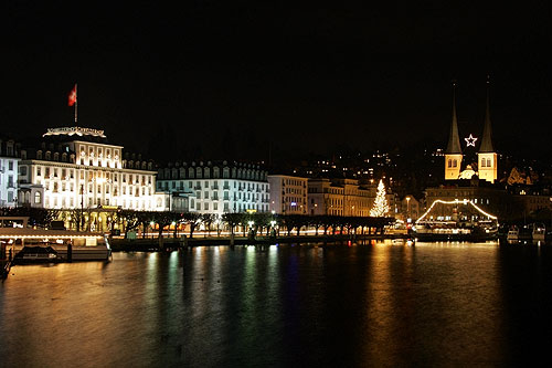 Adventszeit in Luzern: Schweizerhofquai und Hofkirche